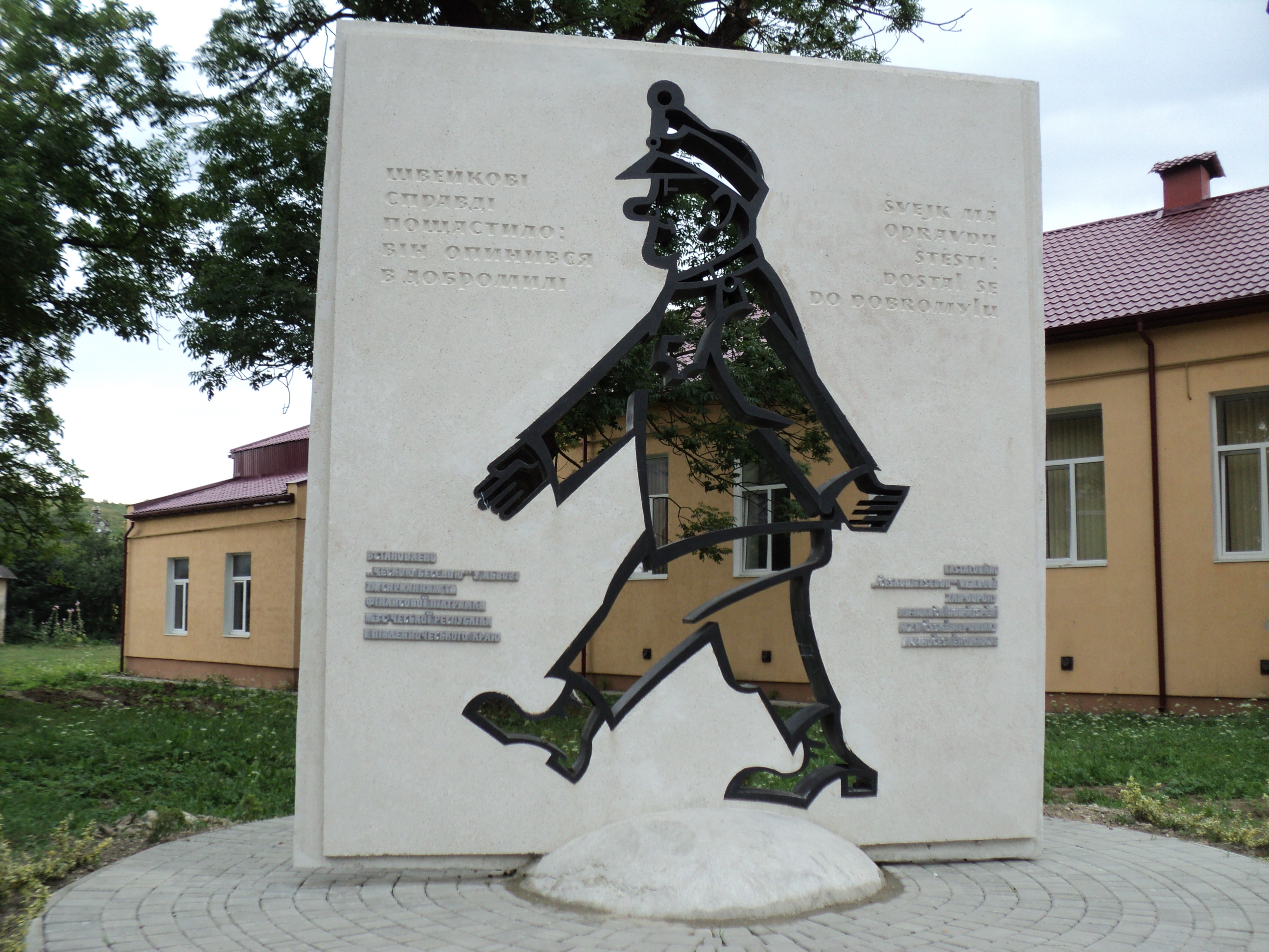 Пам'ятний знак Швейку в Добромилі (Львівська обл., Україна). 2019 рік.